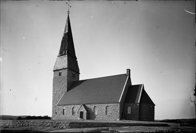 Lyse kyrka